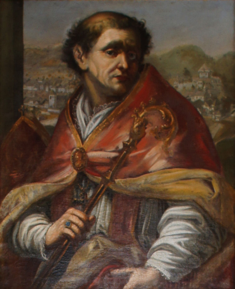 Porträtgemälde von Abraham, Bischof von Freising, im Fürstengang zwischen Fürstbischöflicher Residenz und Freisinger Dom.